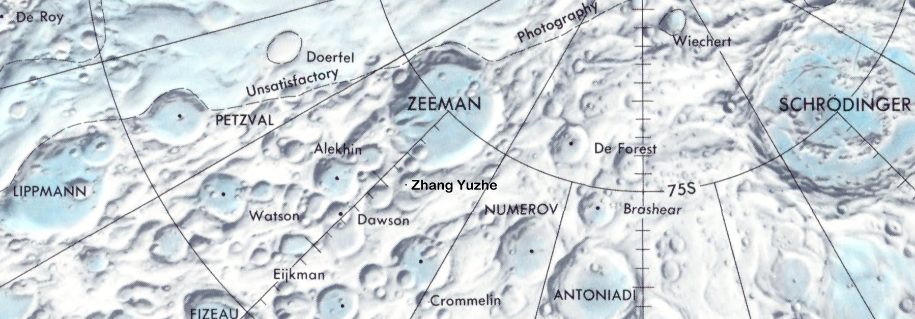 Cráter lunar Zhang Yuzhe. Localización. (Lunar Chart LPC1. Second Edition)